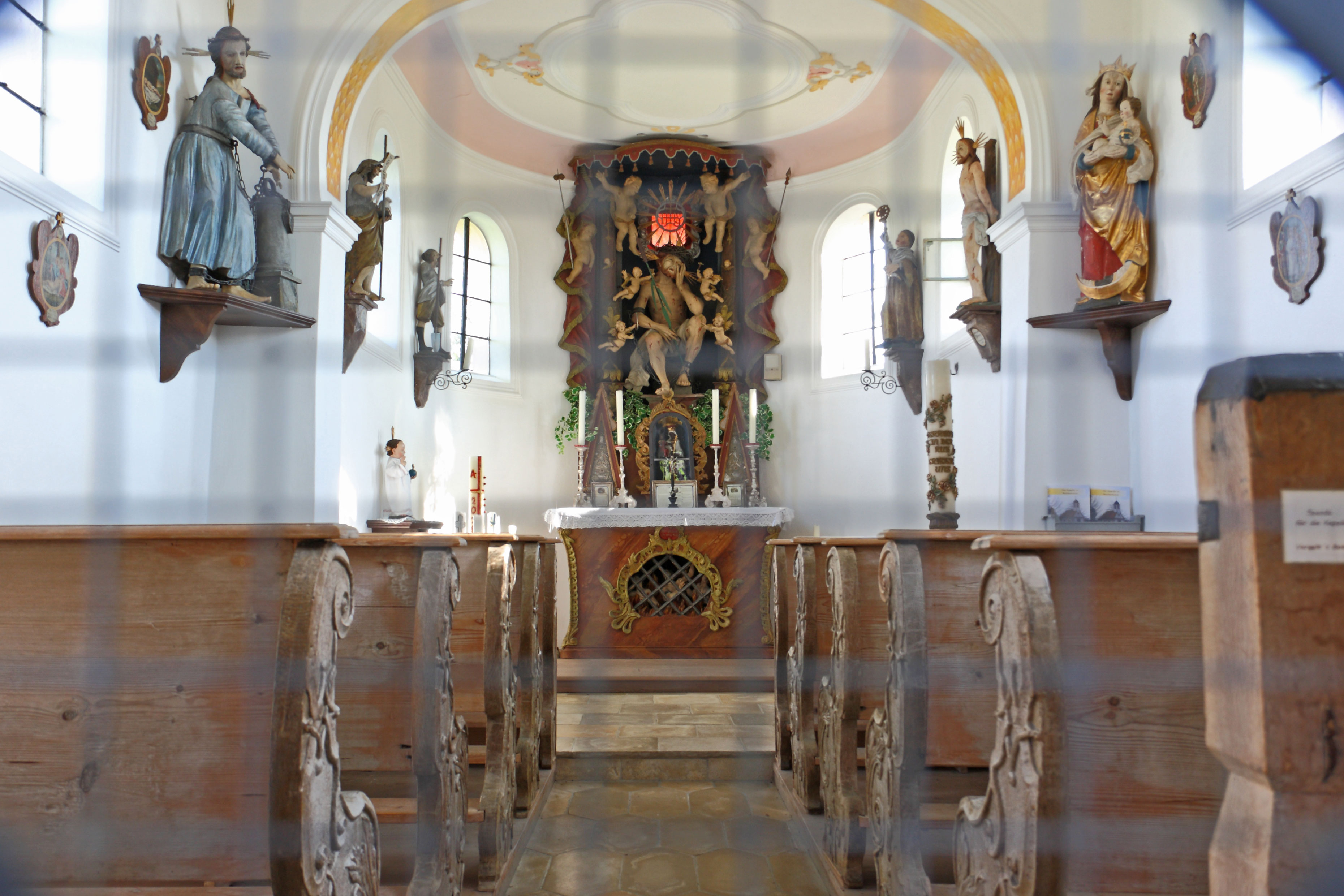 Kapelle zu Unseres Herren Ruh in Reichertsried; Innenansicht mit Holzfigur des von Putten mit Leidenswerkzeugen umgebenen schmerzhaften Heilands. Im Stipes des Altars hinter vergitterter Öffnung holzgeschnitzte Gruppe von Armen Seelen